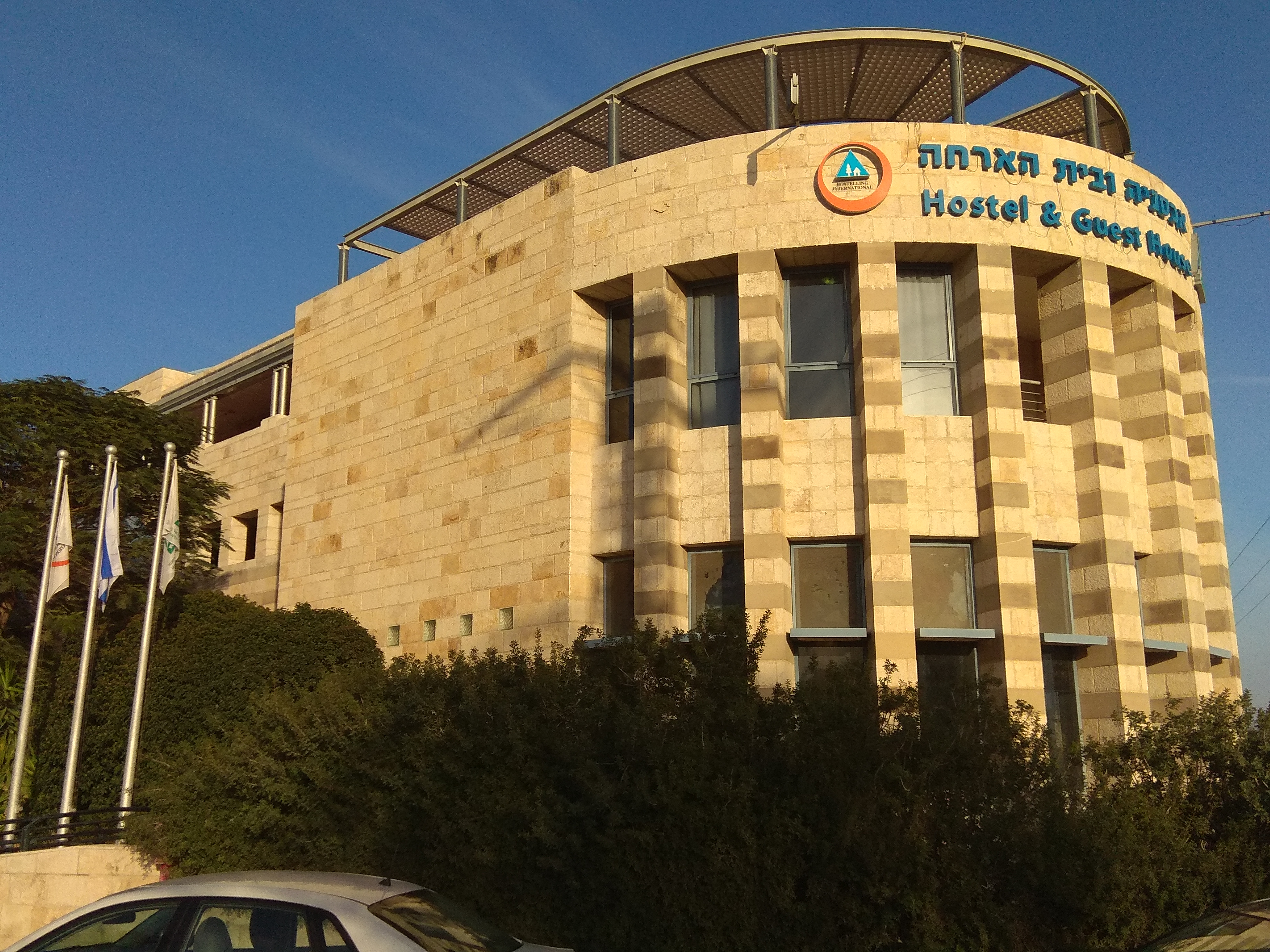 אכסניה ובית הארחה בית שאן